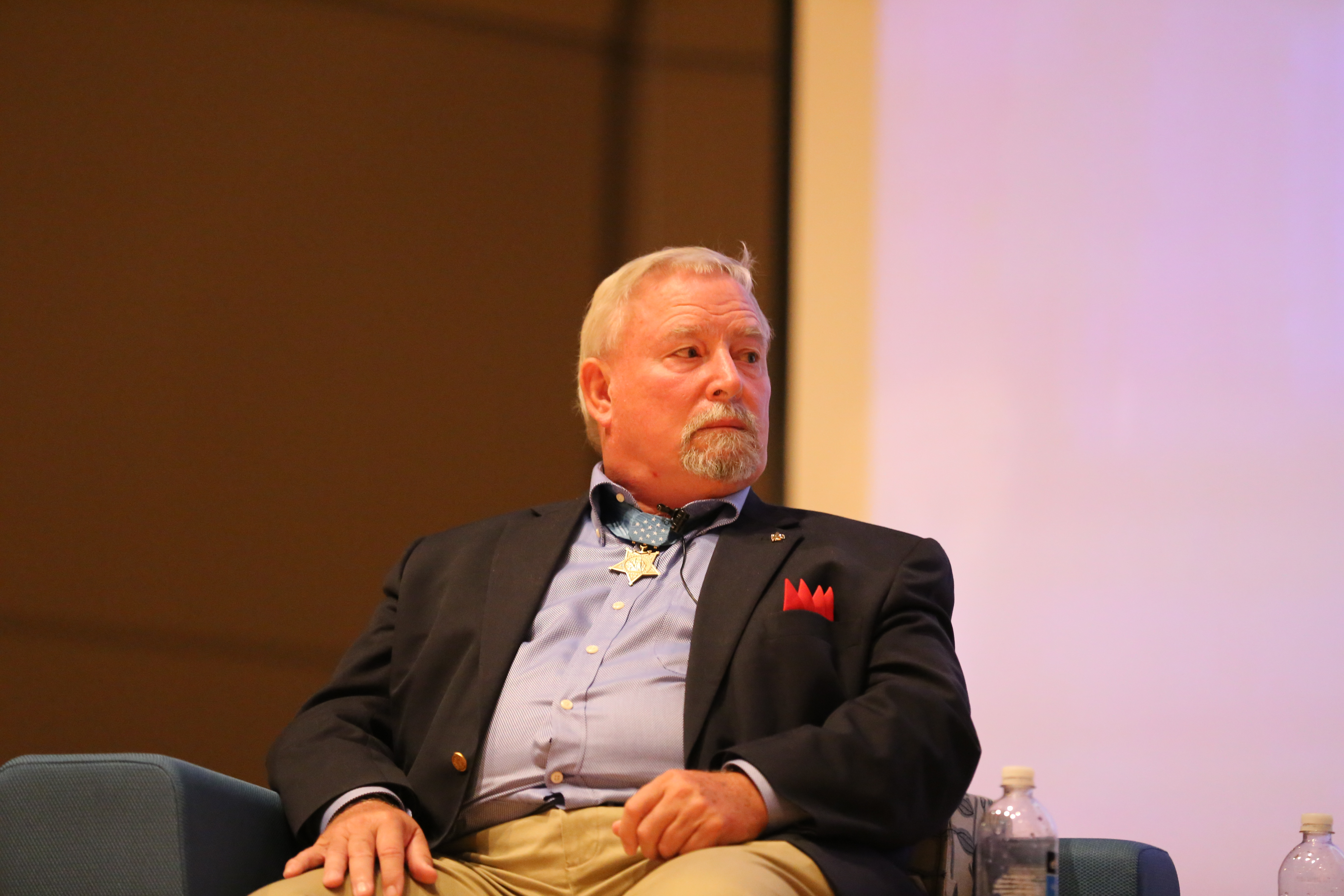 Recipient Donald "Doc" Ballard.